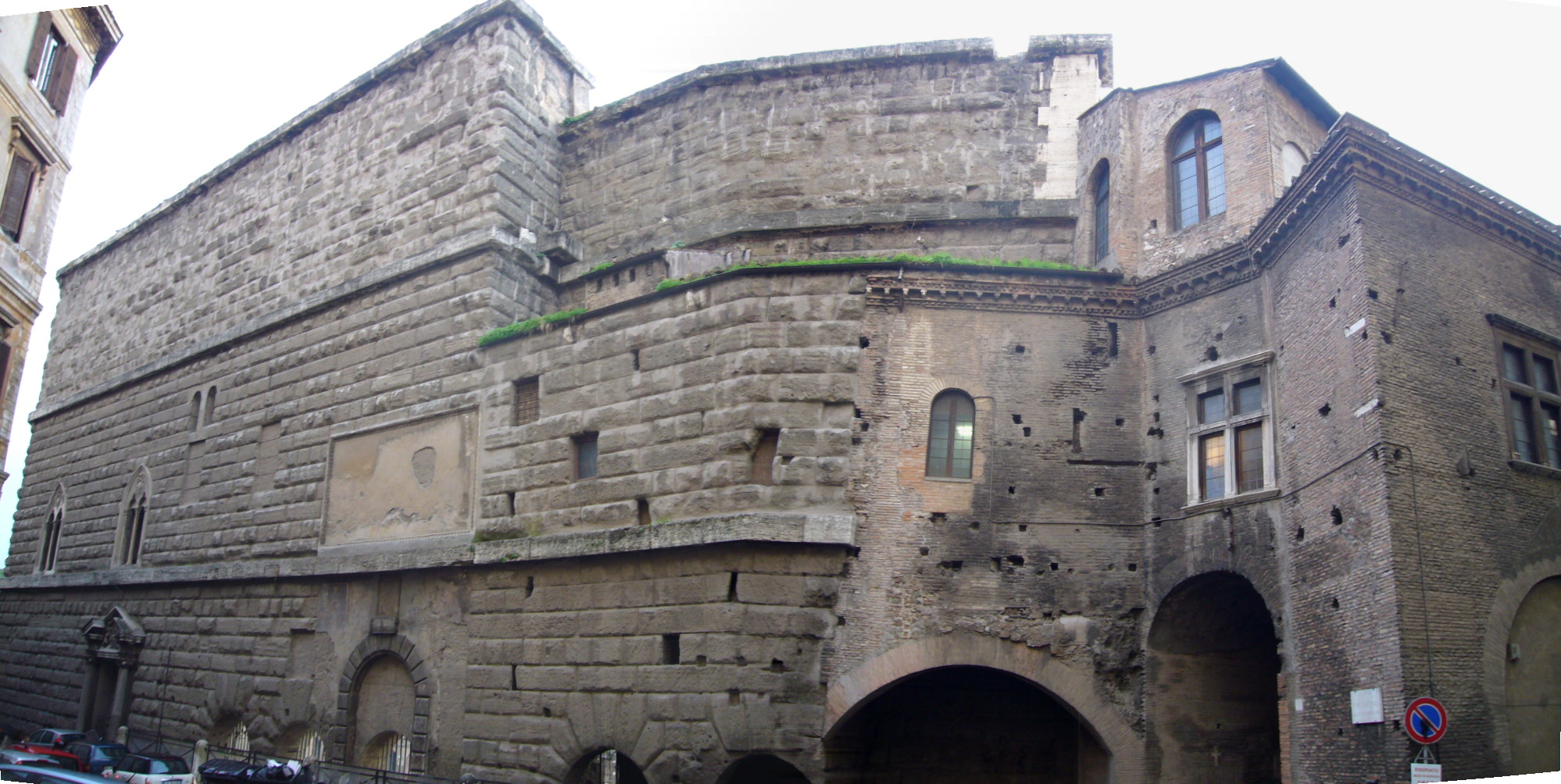 Roma, muro della Suburra e casa dei cavalieri di Rodi su via Tor de' Conti dalla salita del Grillo